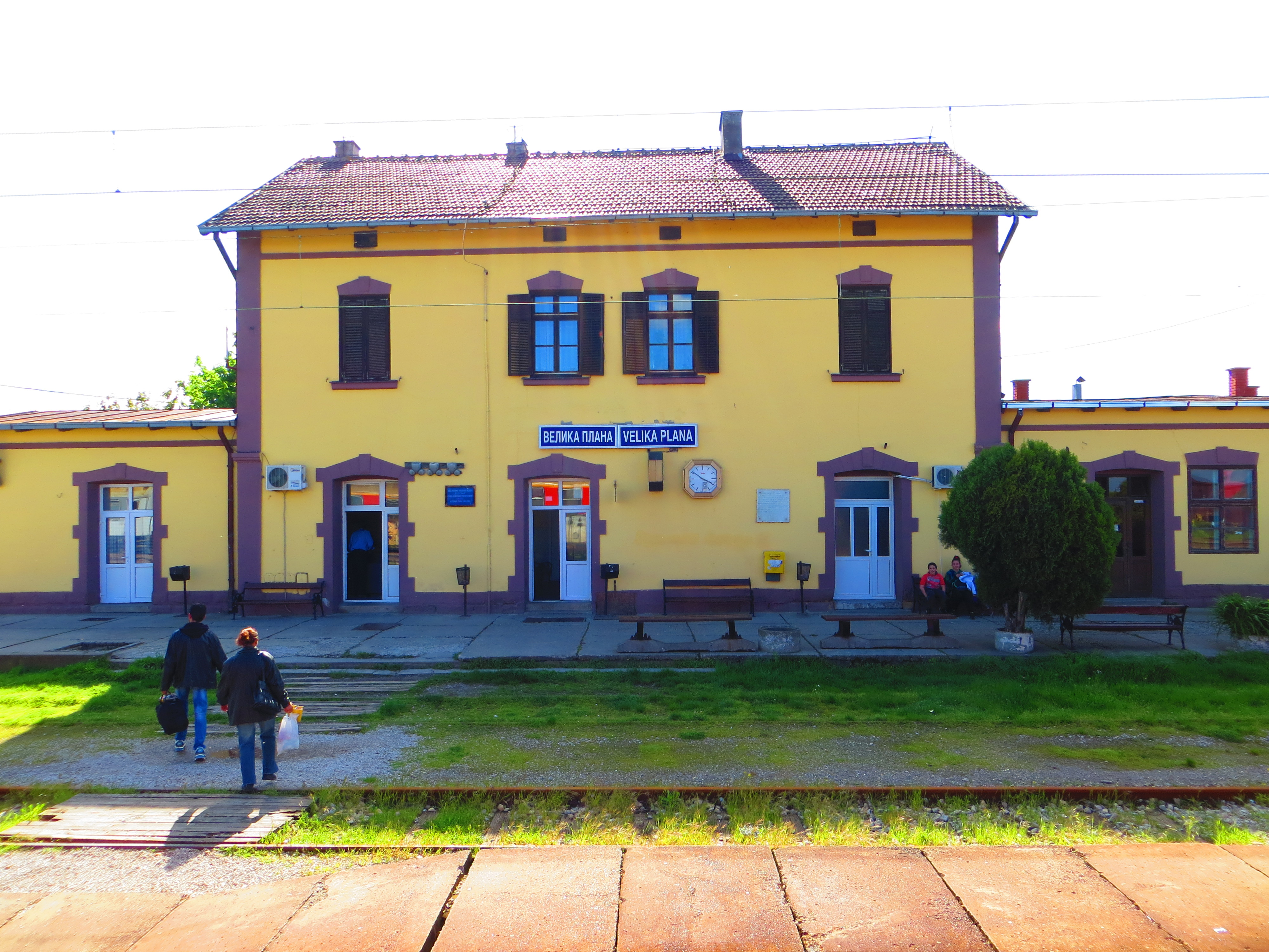 Železnička stanica - Velika Plana